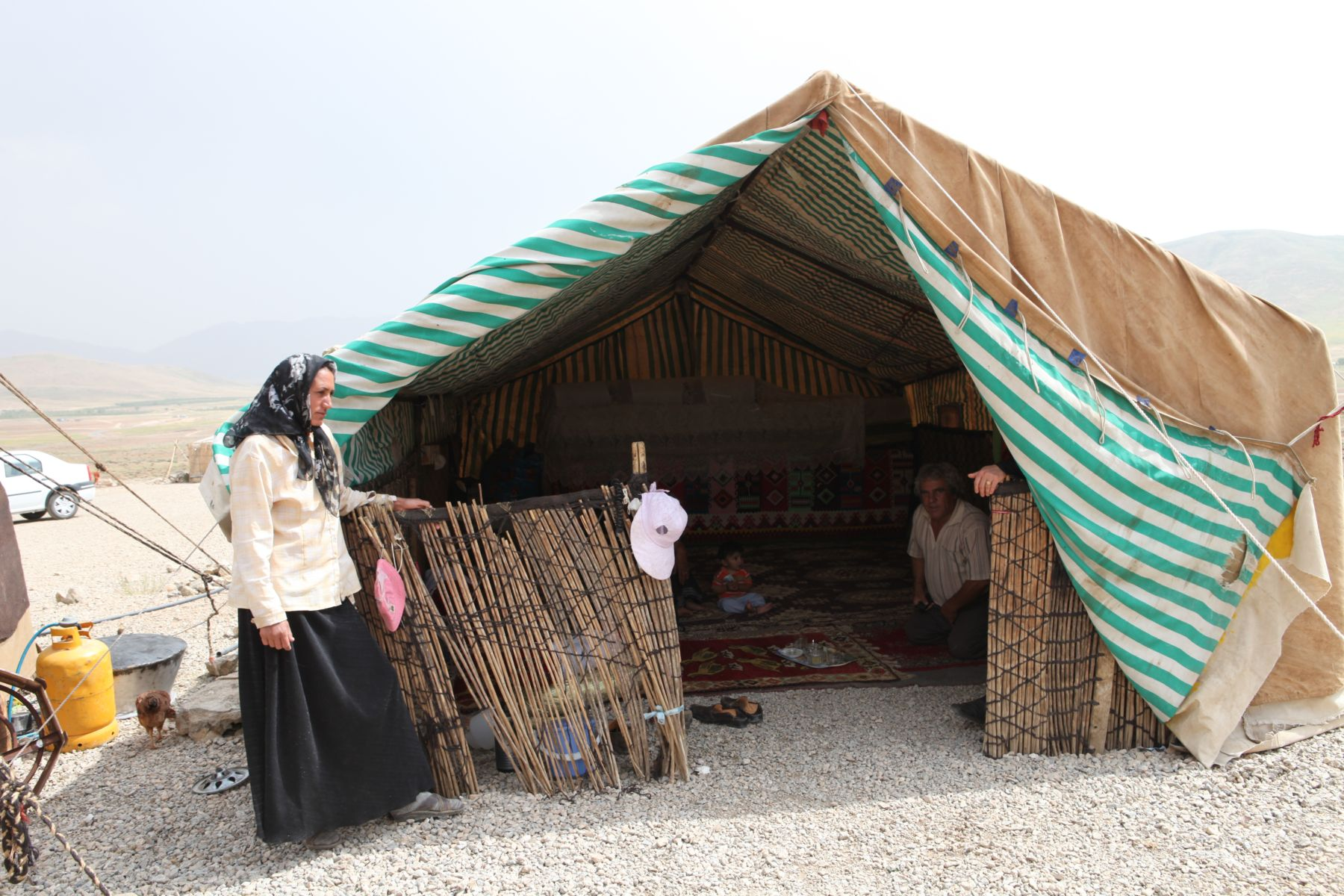 یک خانواده ایلیاتی قشقایی از اهالی استان فارس که درسیاه‌چادر زندگی می‌کنند.